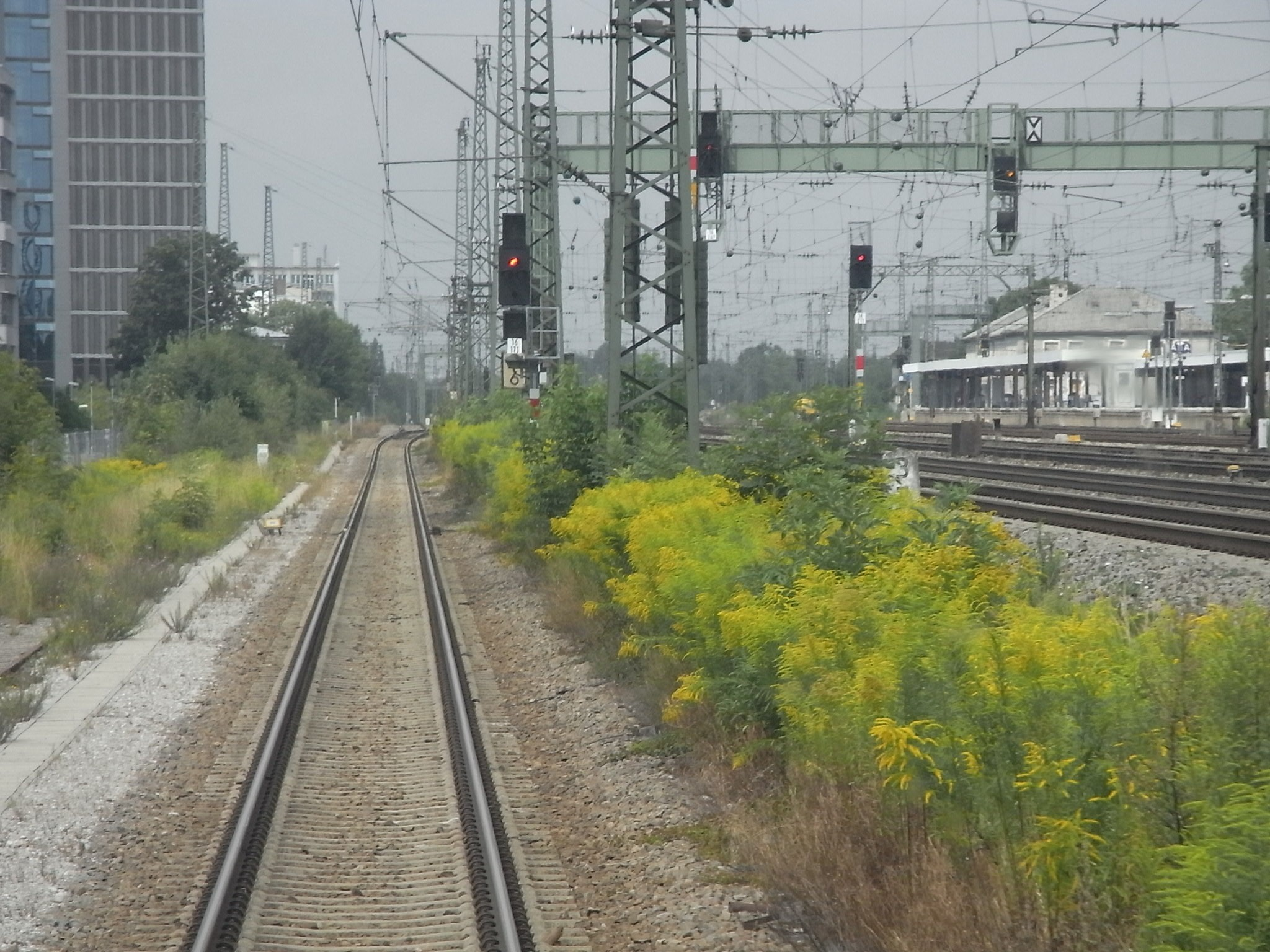 S-Bahnhof München Laim, aus Vorbeifahrt auf dem Gleis von/nach Heimeranplatz und Südring (Sendlinger Spange).